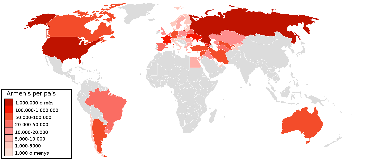 Mapa dels armenis a cada país generats per la diàspora del Genocidi Armeni